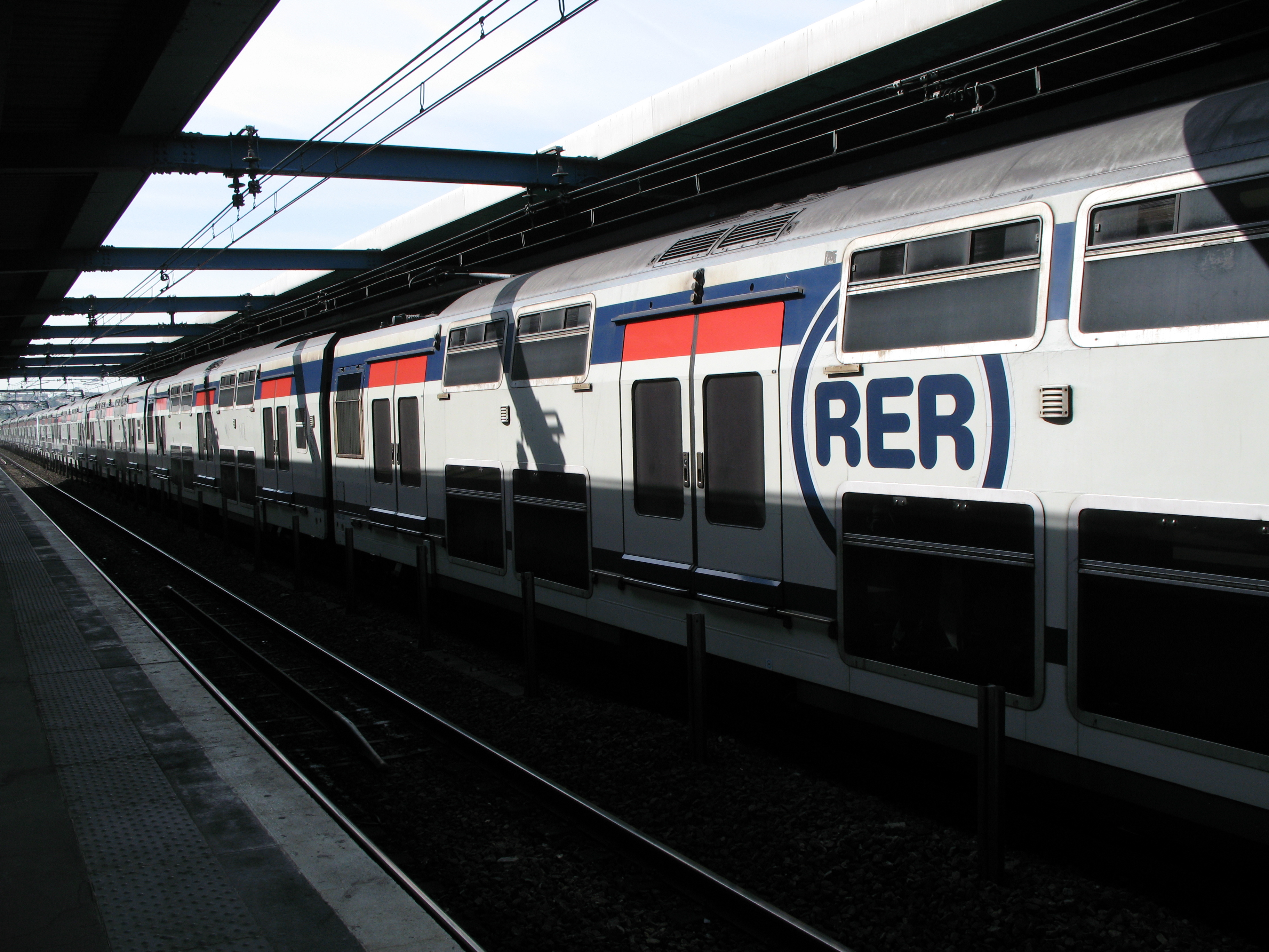 Une rame double étage sur le RER parisien.